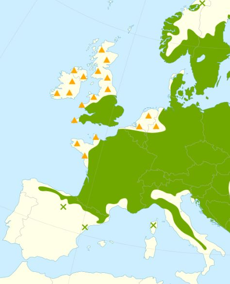 Verbreiding van de winterlinde in West-Europa